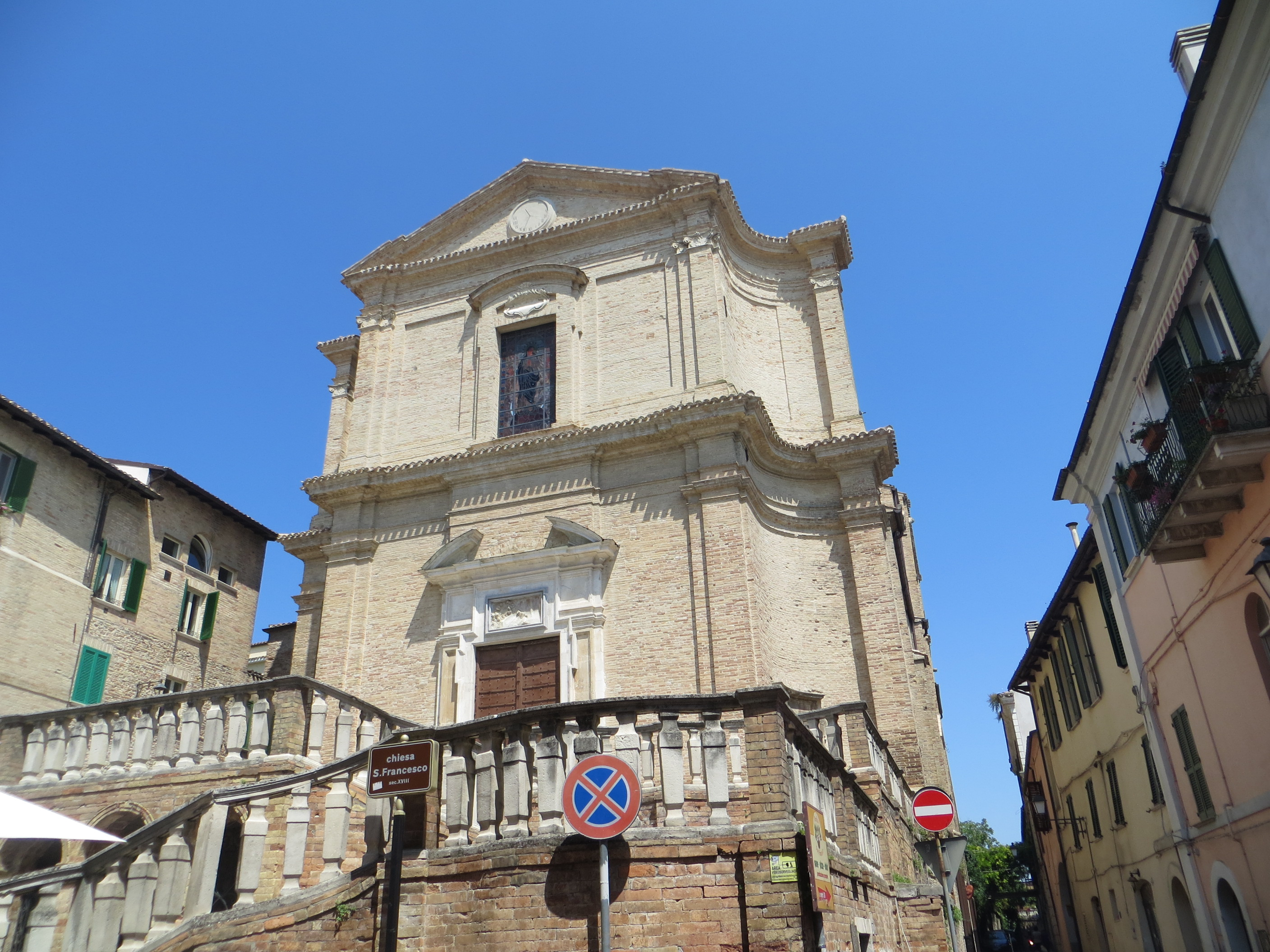 Chiesa di san Francesco ad Atri